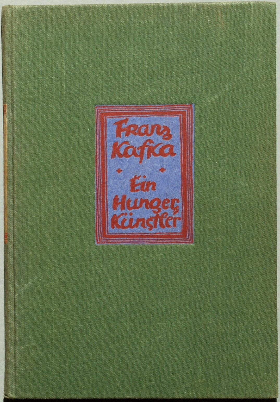 Kafka, Franz: Ein Hungerkünstler. Vier Geschichten. Berlin: Die Schmiede 1924, 85 Seiten + 1 nicht paginierte Seite + 1 Blatt verso Druckvermerk. Erstausgabed (Dietz 66, Raabe 7; Wilpert/Gühring² 7). Grünes Original-Leinen 8° mit Rücken- und Titelschild; Dickdruck-Papier, rauher Schnitt. Kafkas letzte Veröffentlichung erschien kurz nach seinem Tod. Den ersten Bogen des Buches hat er noch selbst korrigiert. Einbandvariante in Leinen.